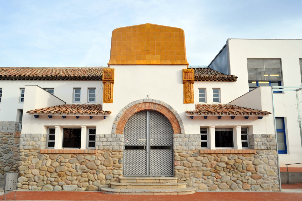 Conjunt d'escoles i ajuntament